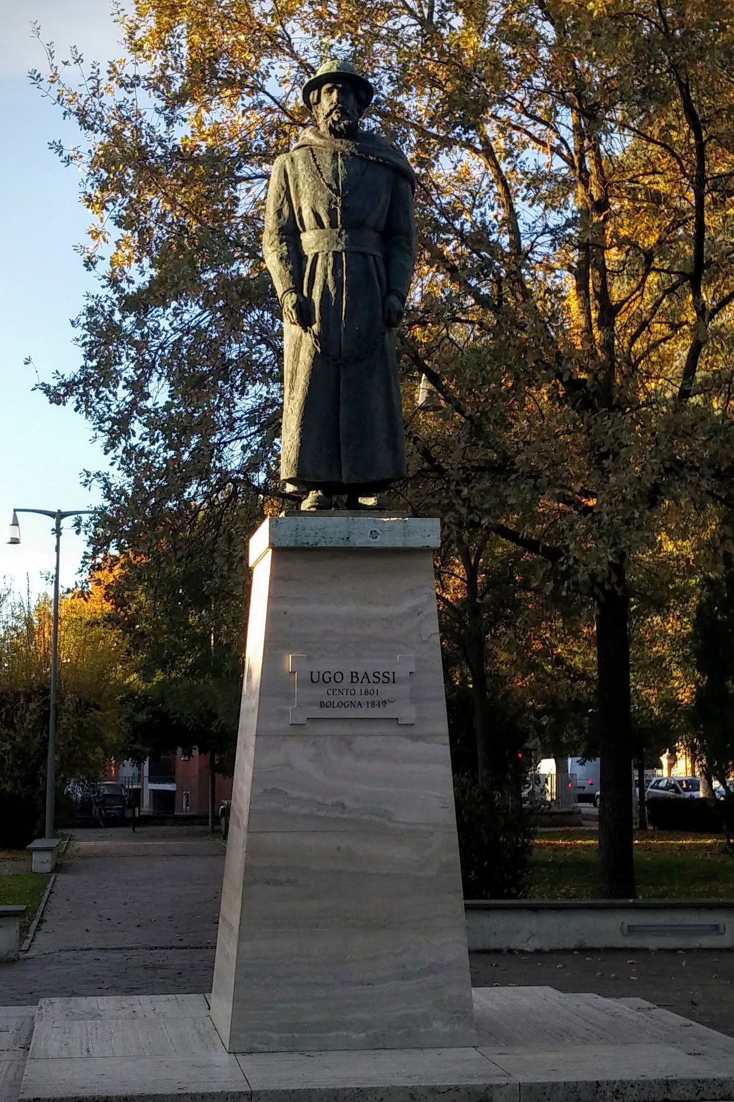 Pasqualini Enzo (1916-1998), statua di Ugo Bassi, (1961), l'opera è situata al centro dell'omonimo giardino a Cento (FE)